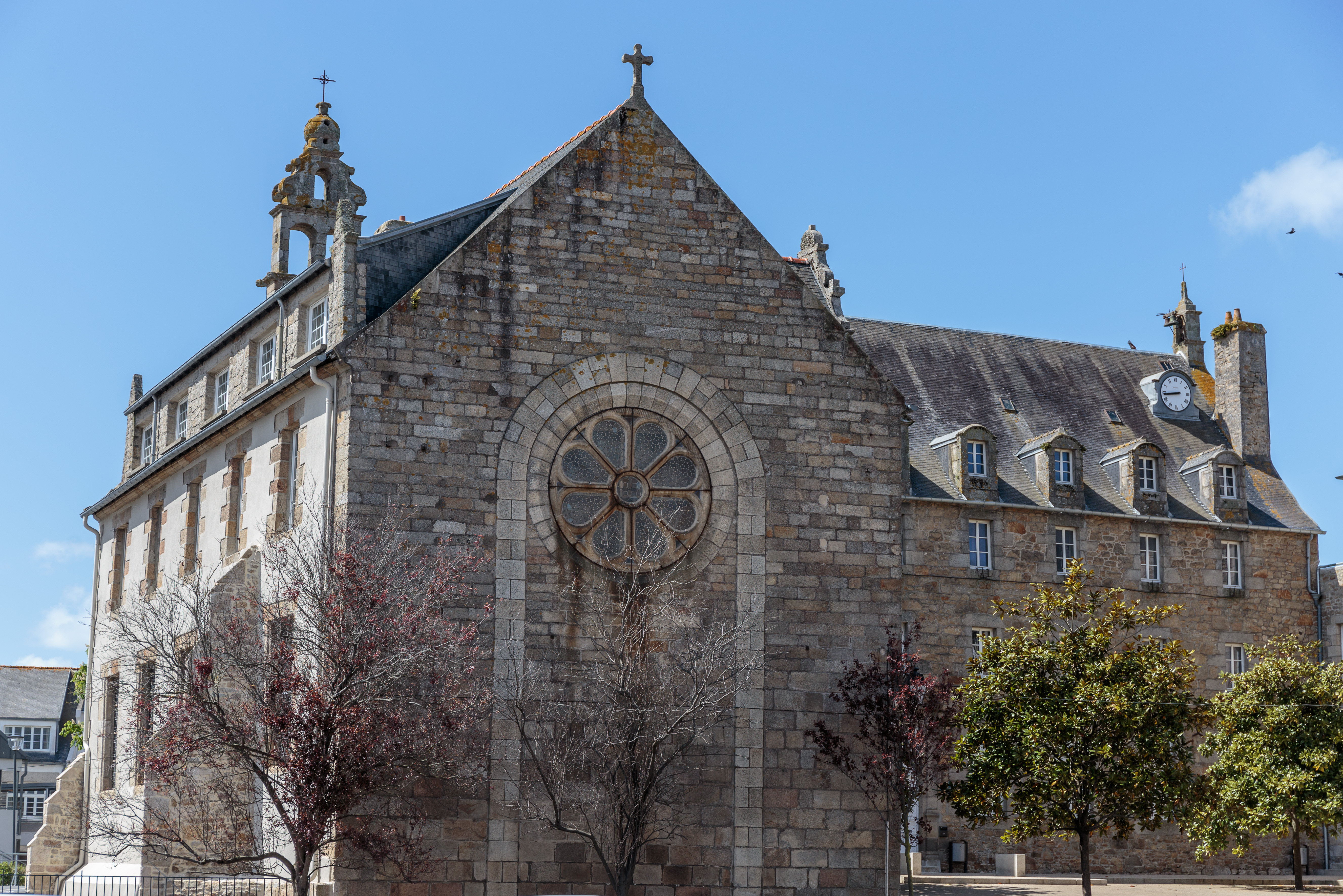 Bâtiment historique du lycée du Kreisker construit en 1708 et sa chapelle de la Sainte Famille.